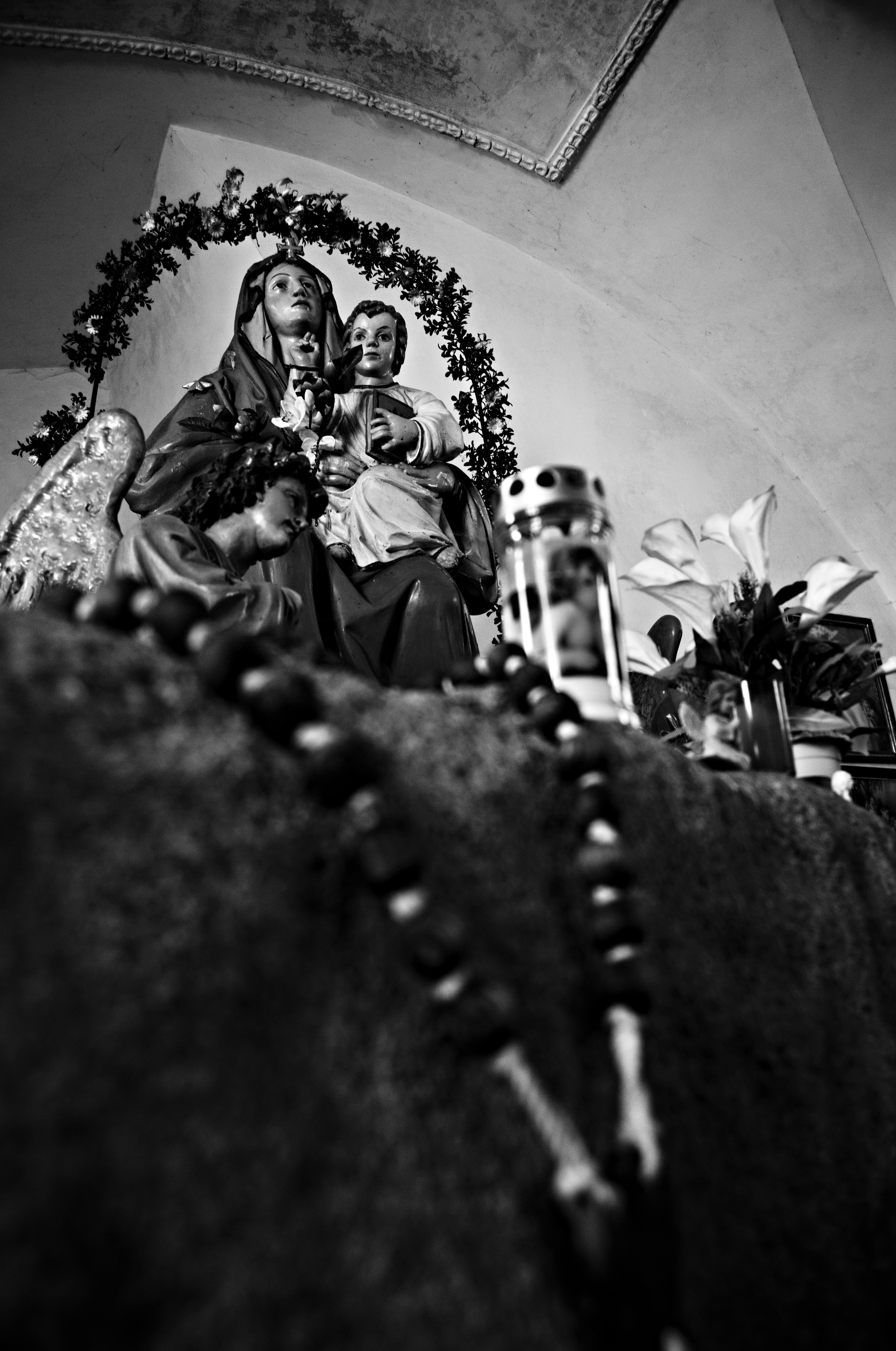 Pánna Mária v kapličke s dvoma veľkými kameňmi v Svätom Kameni v južných Čechách. Foto: Milan Fujda.